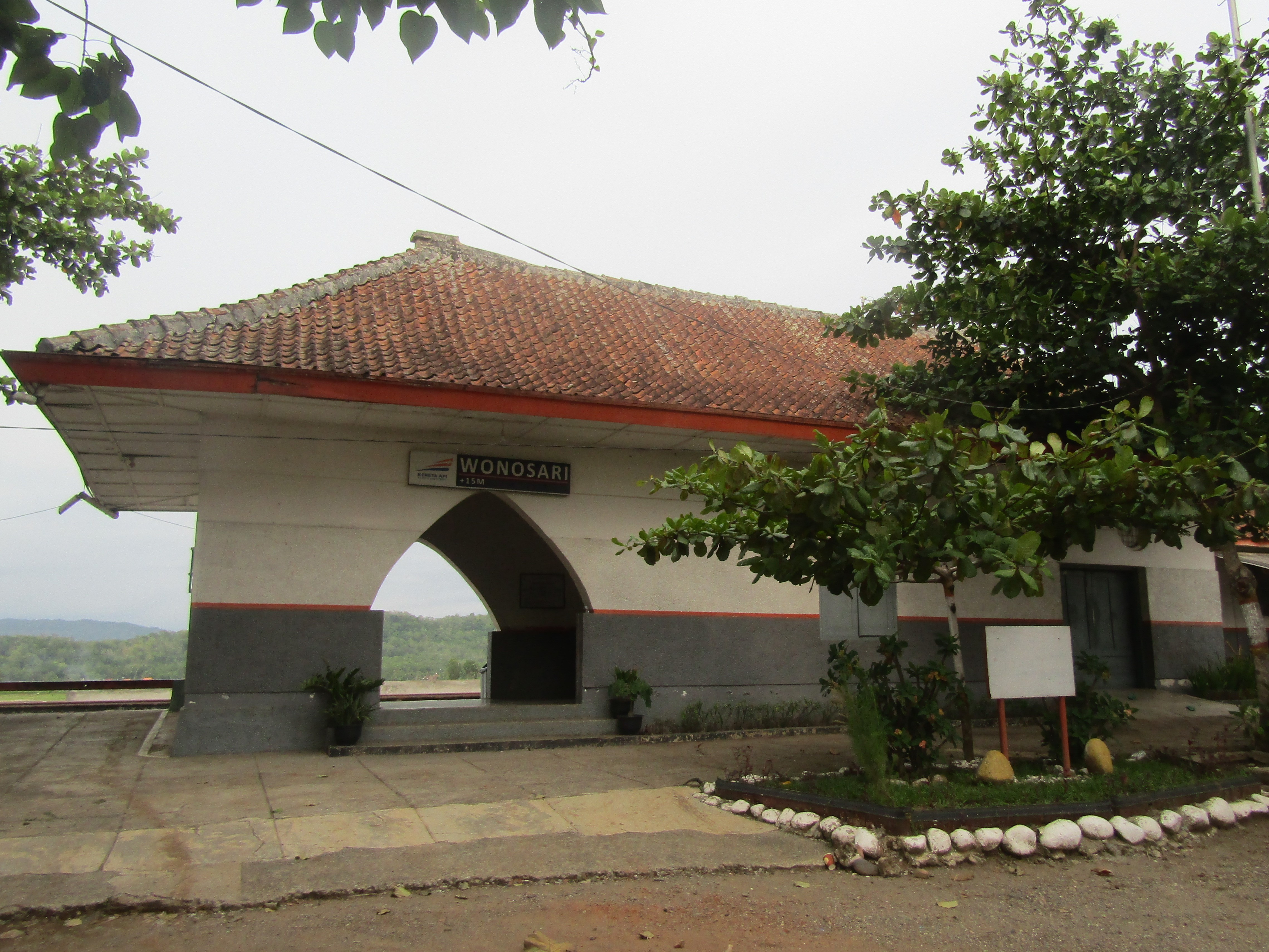 Bangunan utama Stasiun Wonosari tahun 2019